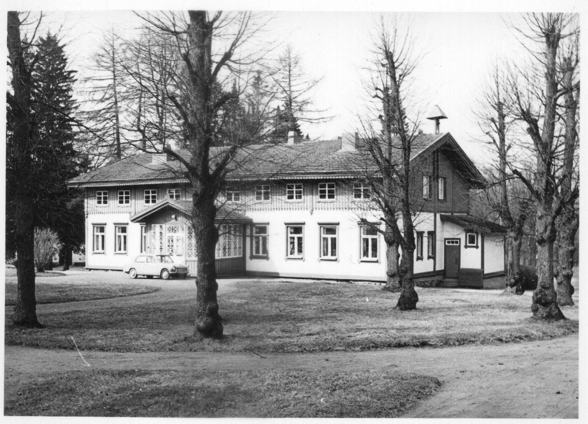 Nordenlund manor in Sysmä, Finland